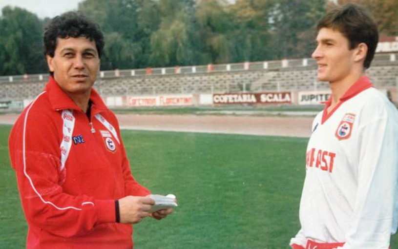 Ioan Ovidiu Sabau training for Dinamo